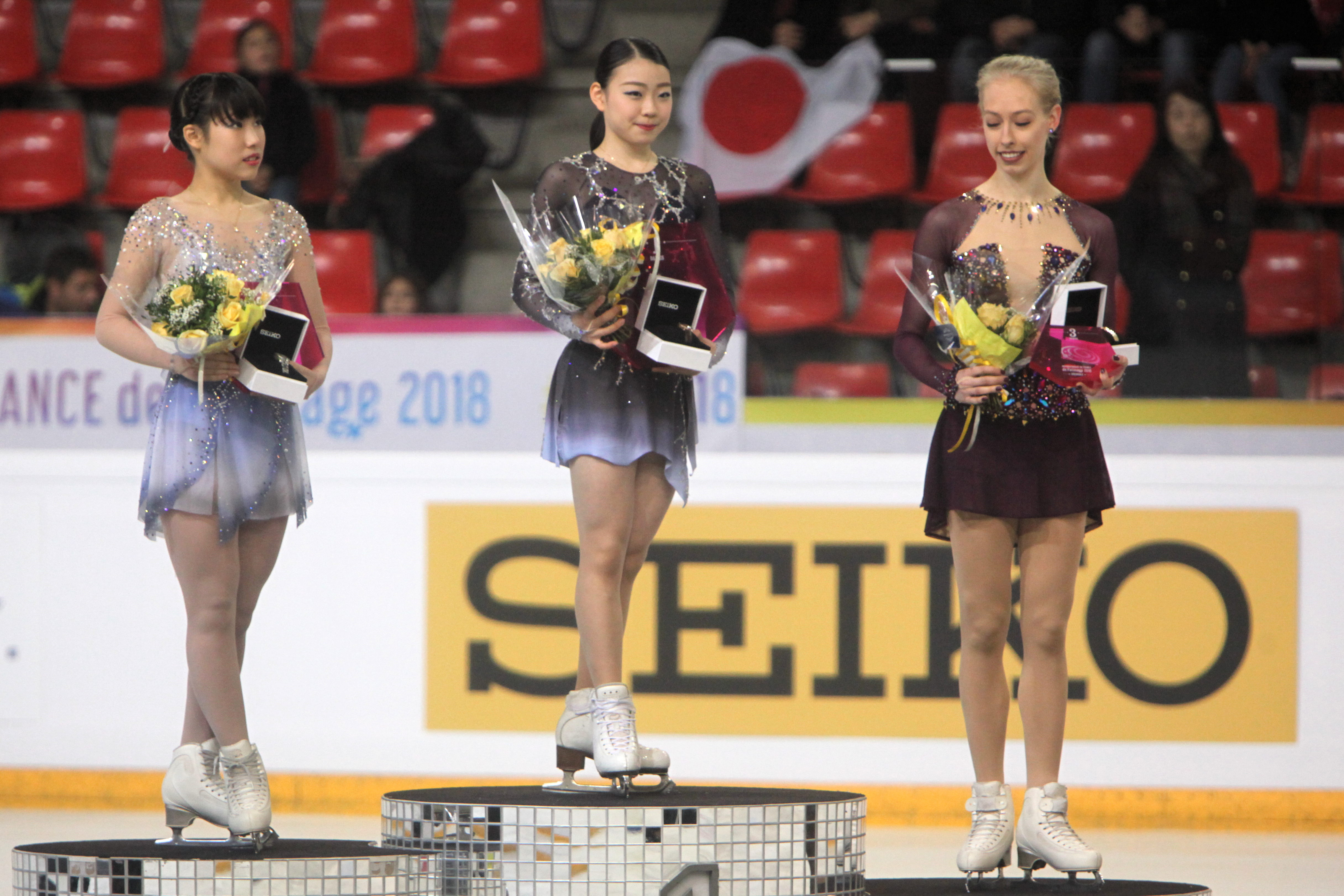 Internationaux de France de Patinage 2018, Ladies.